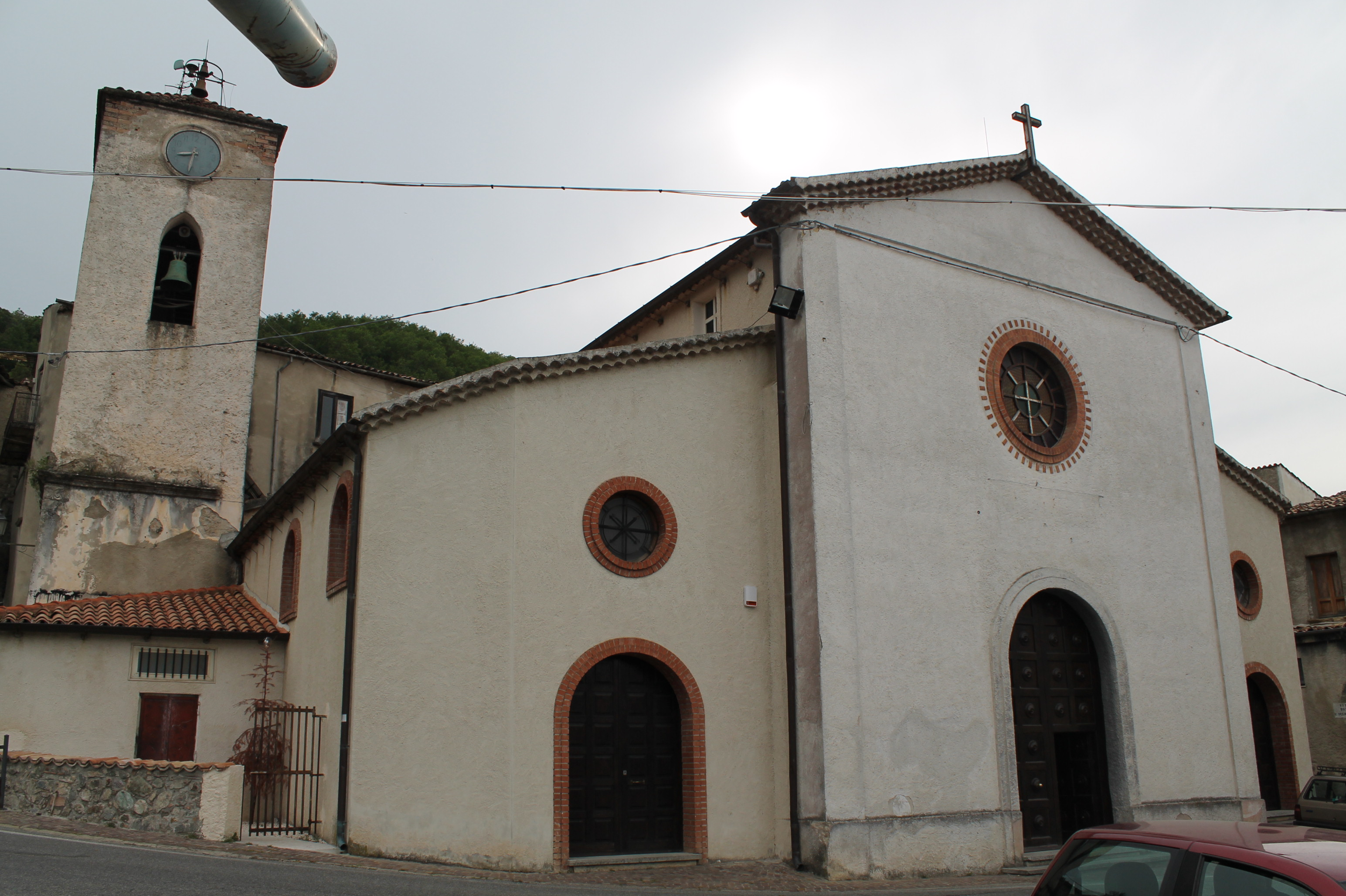 Chiesa Matrice San Martino di Finita (ITALIA)